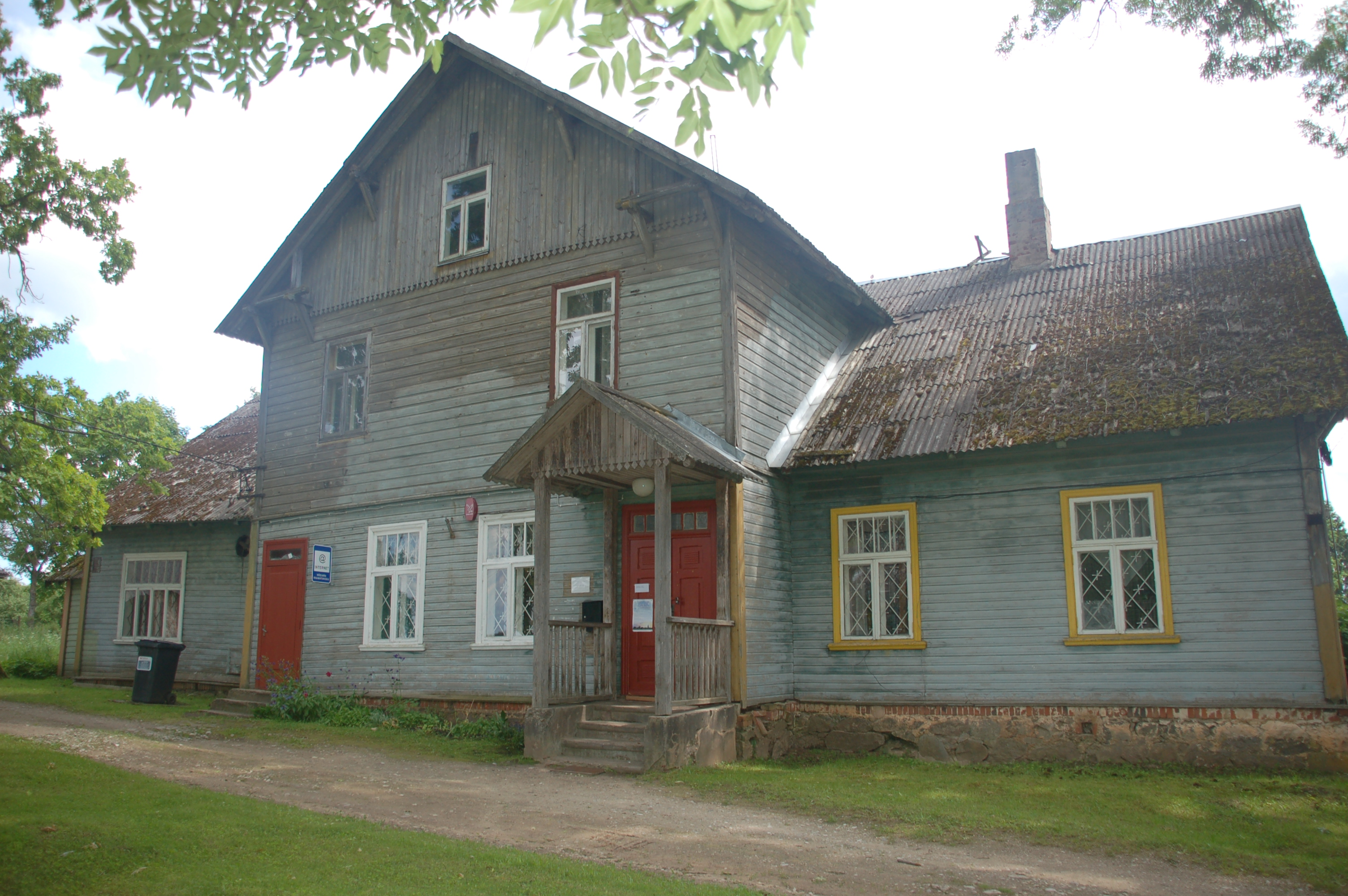 Nõgiaru raamatukogu